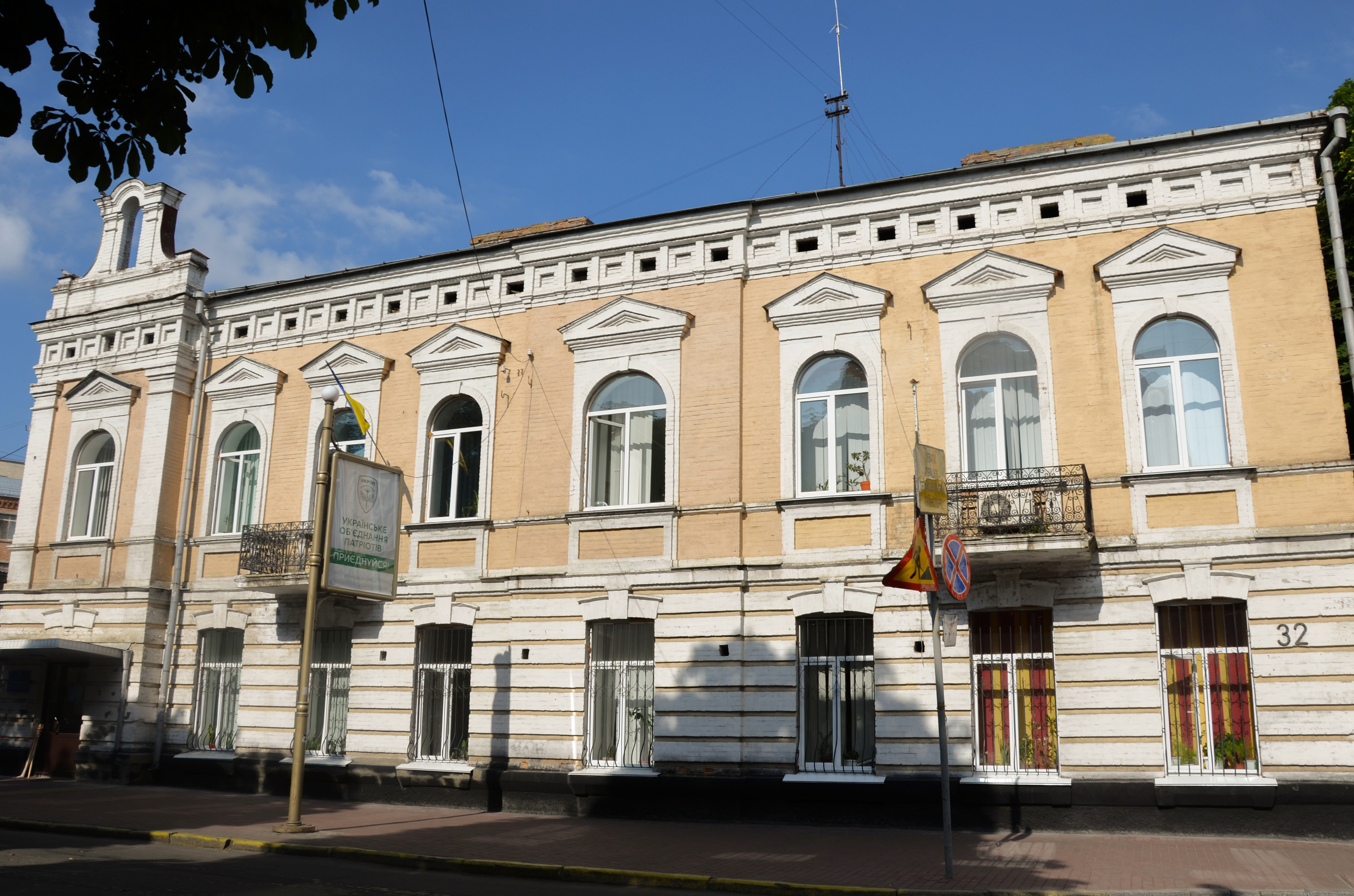 Пам'ятка архітектури у місті Хмельницькому. Вулиця Проскурівського підпілля, 32.